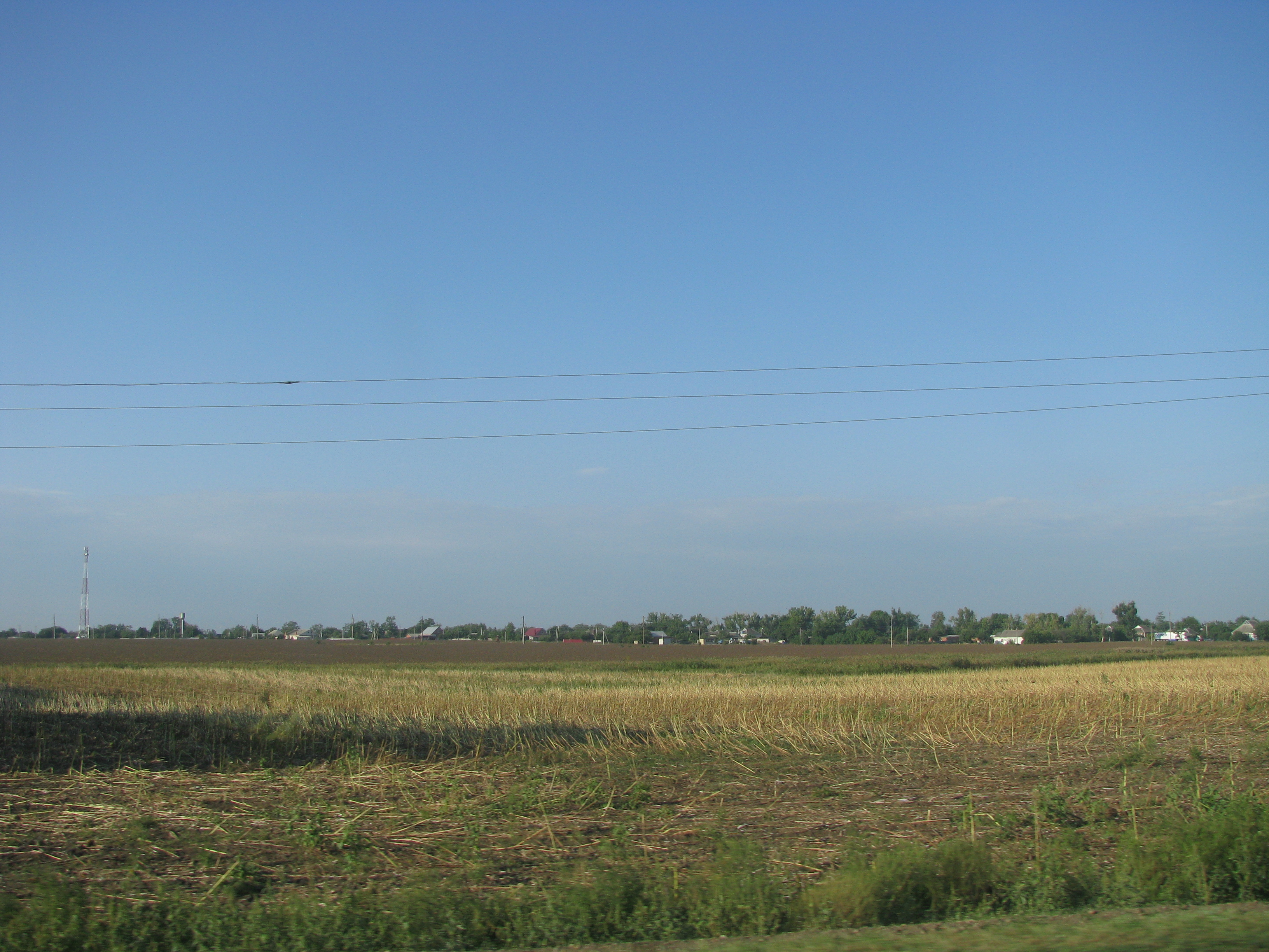 Вид на станицу Переясловская с объездной трассы